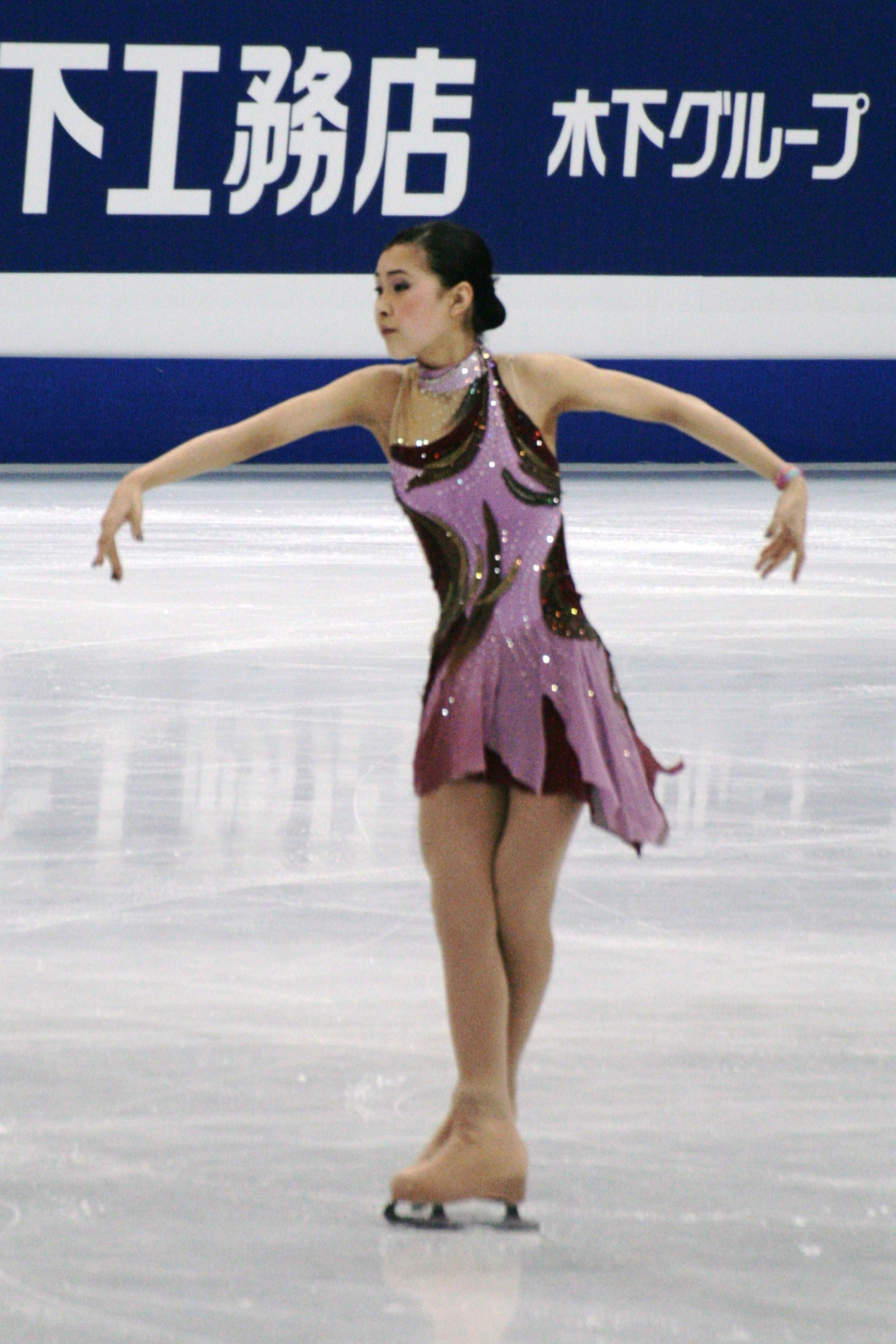 Канако Мураками (Япония) на чемпионате мира по фигурному катанию 2012